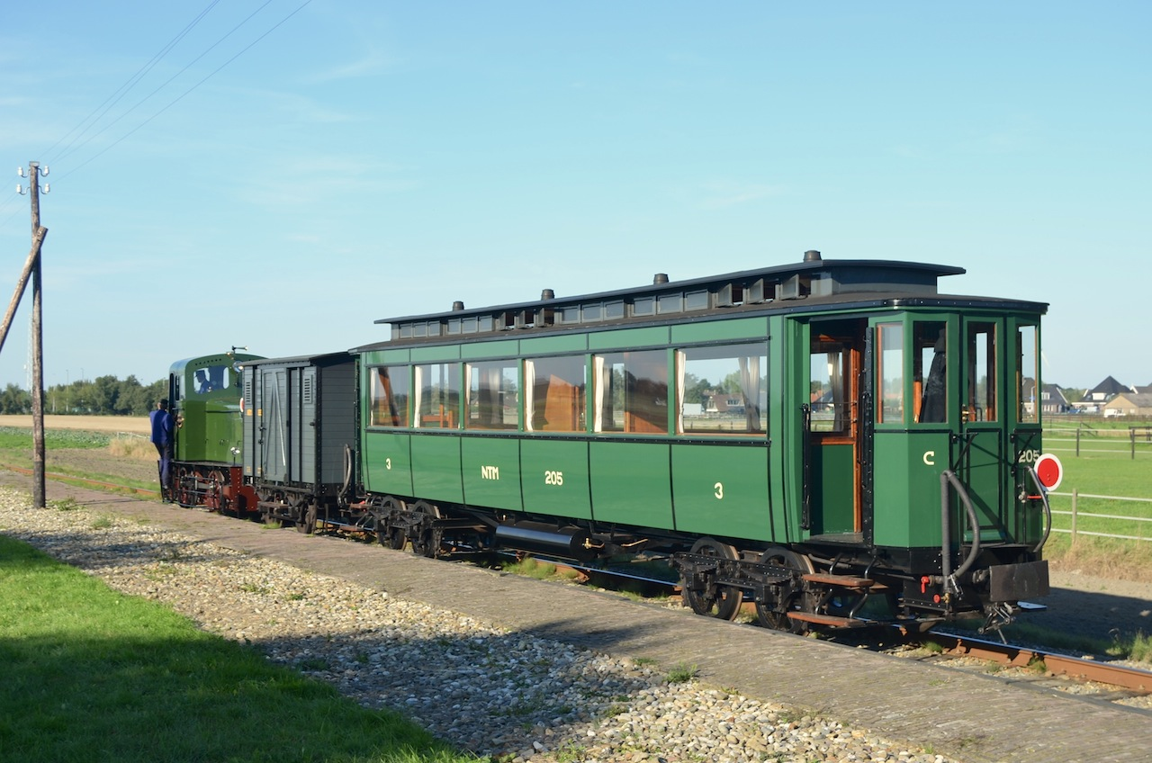 SHM rijtuig C 205 van de Nederlandse Tramweg Maatschappij, te Twisk; 29 september 2013. Foto: Erik Swierstra.